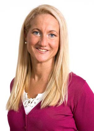 Cecilia Widegren, riksdagsledamot från Skaraborg och vice ordförande i försvarsutskottet